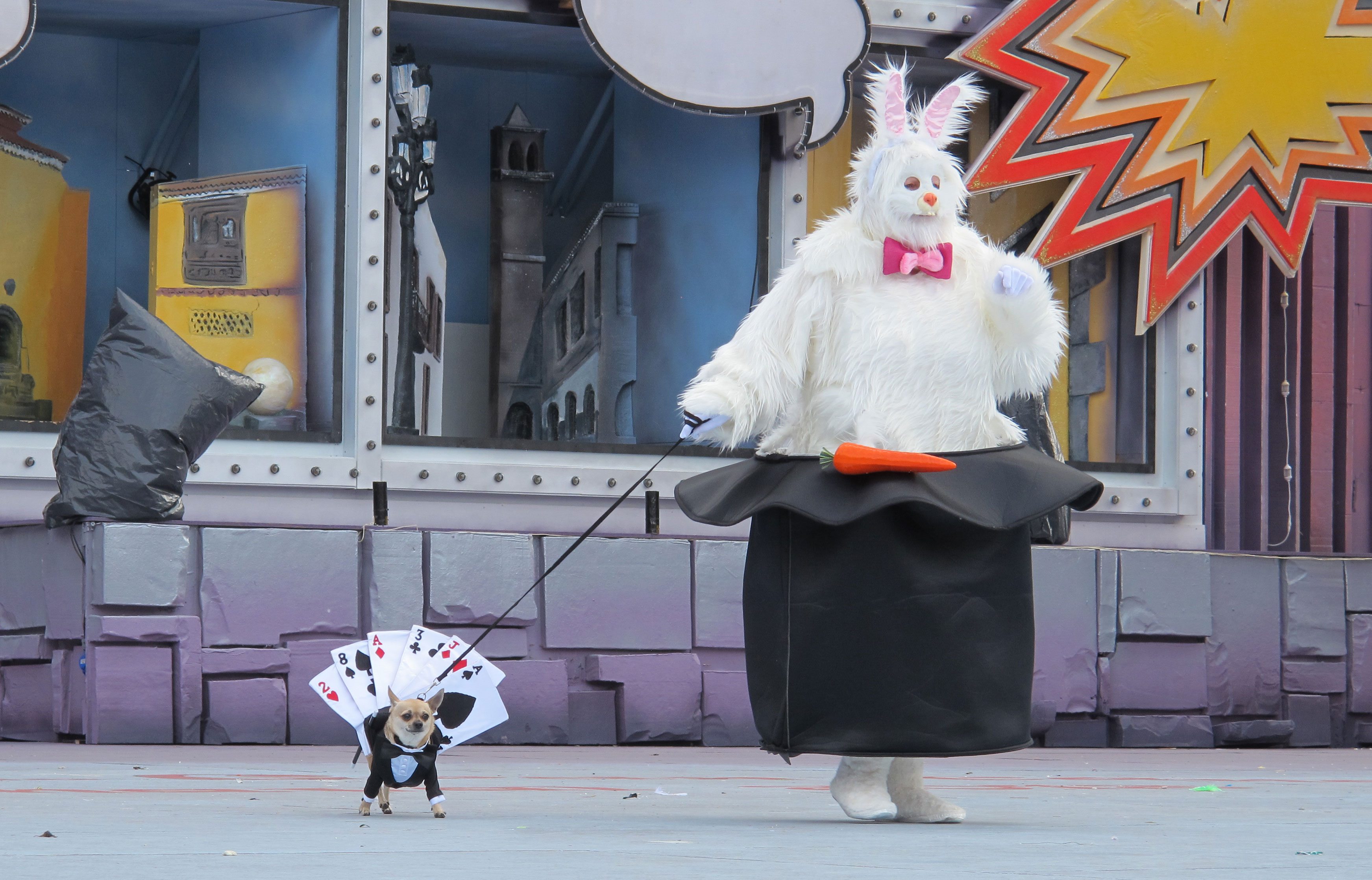 Foto del ganador del concurso Carnaval Canino 2012 del Carnaval de Las Palmas de Gran Canaria.